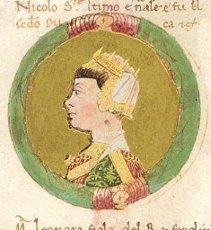 Profilo di Eleonora d'Aragona, miniatura da "Genealogia dei Principi d'Este" (MS. membr. L.5.16 Ital. 720; Modena, Biblioteca Estense)